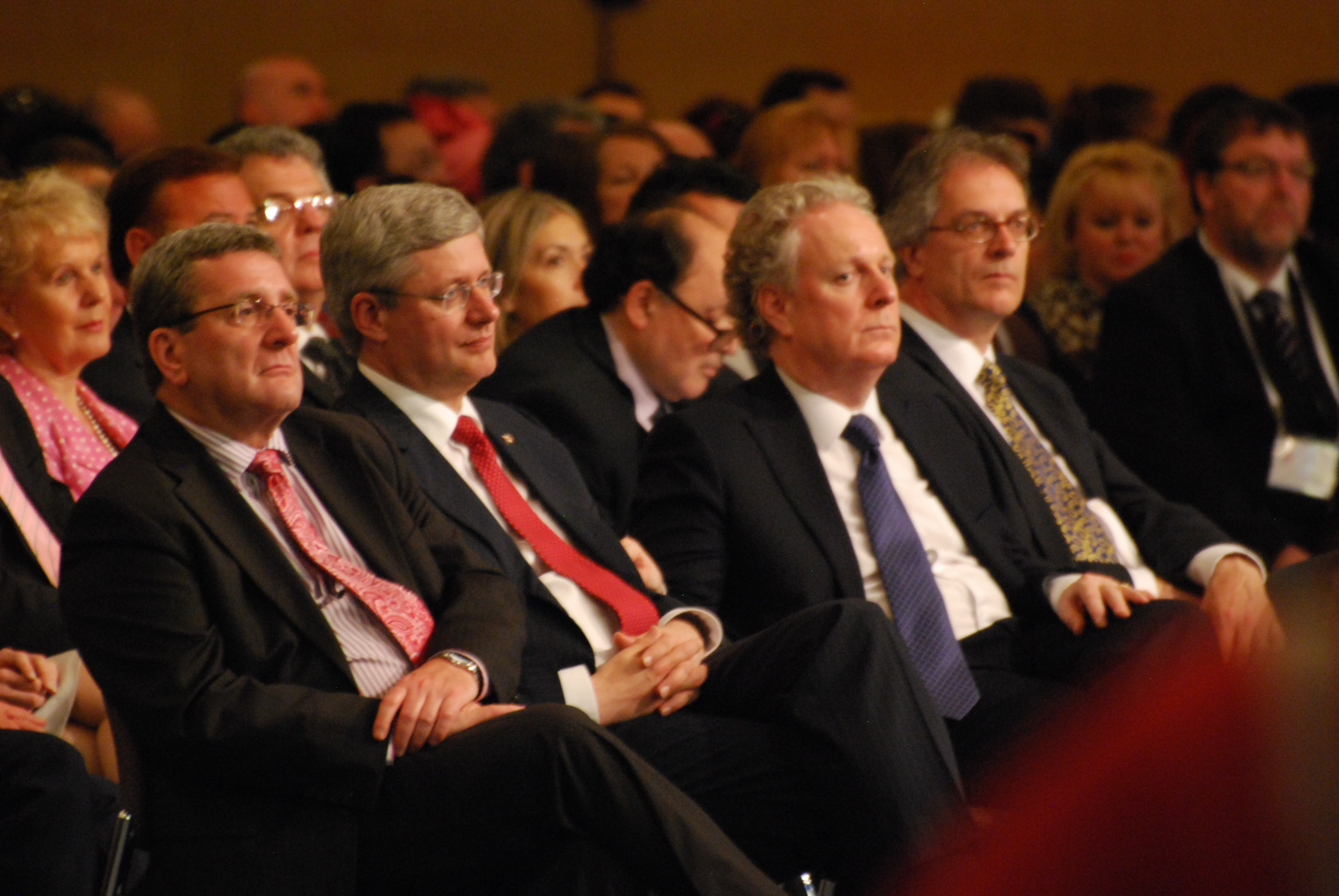 Régis Labeaume, Stephen Harper et Jean Charest au Forum mondial de la langue française.